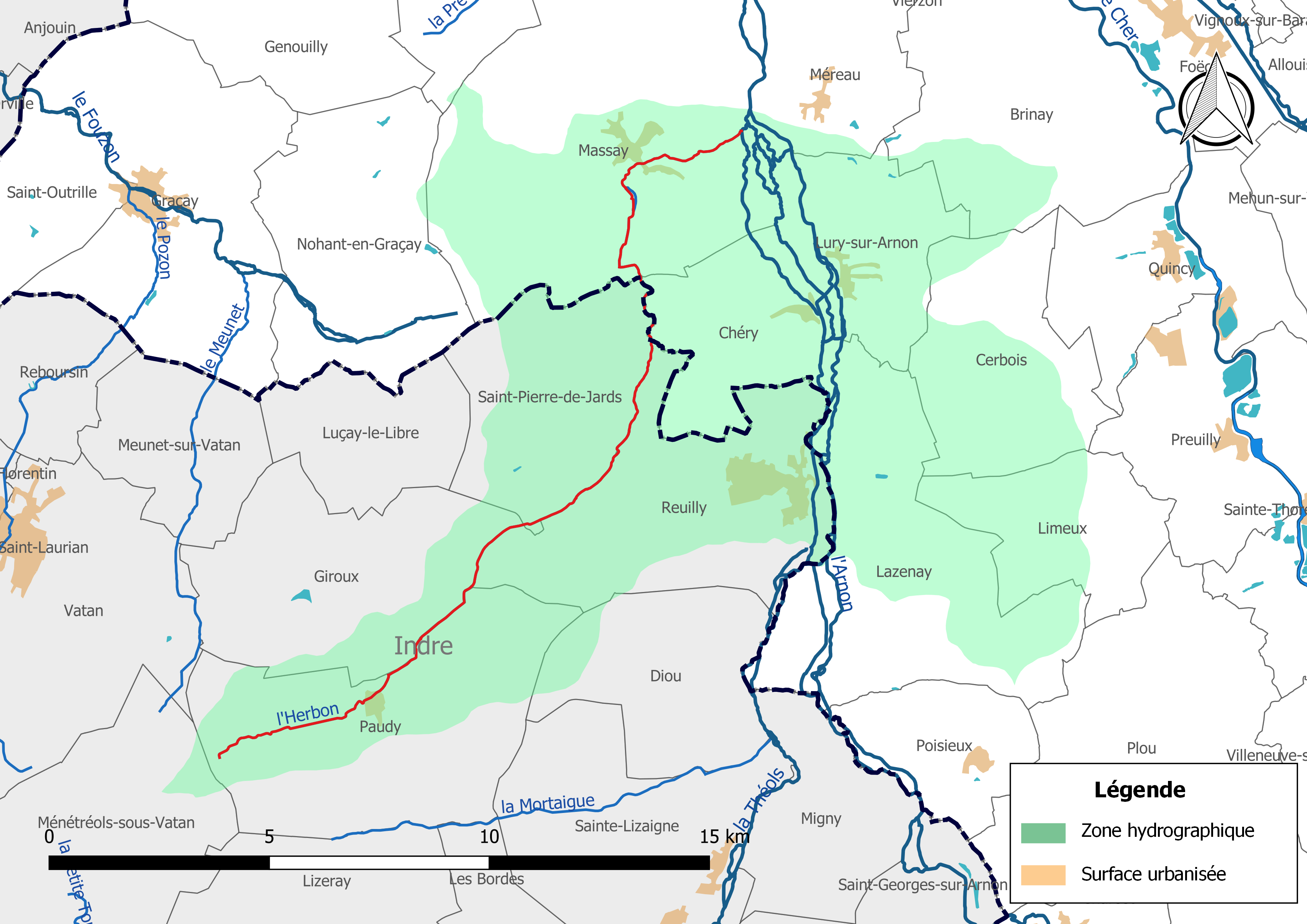 Carte du cours d'eau « l'Herbon » (France) et de la zone hydrographique dans laquelle il s'insère.